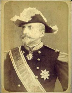 Луи Антонович Ге, консул Франции в Севастополе